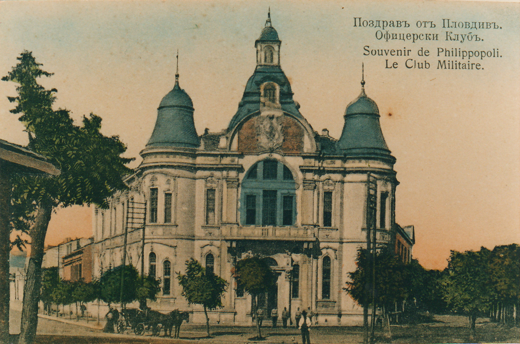 Военен клуб, Пловдив, България